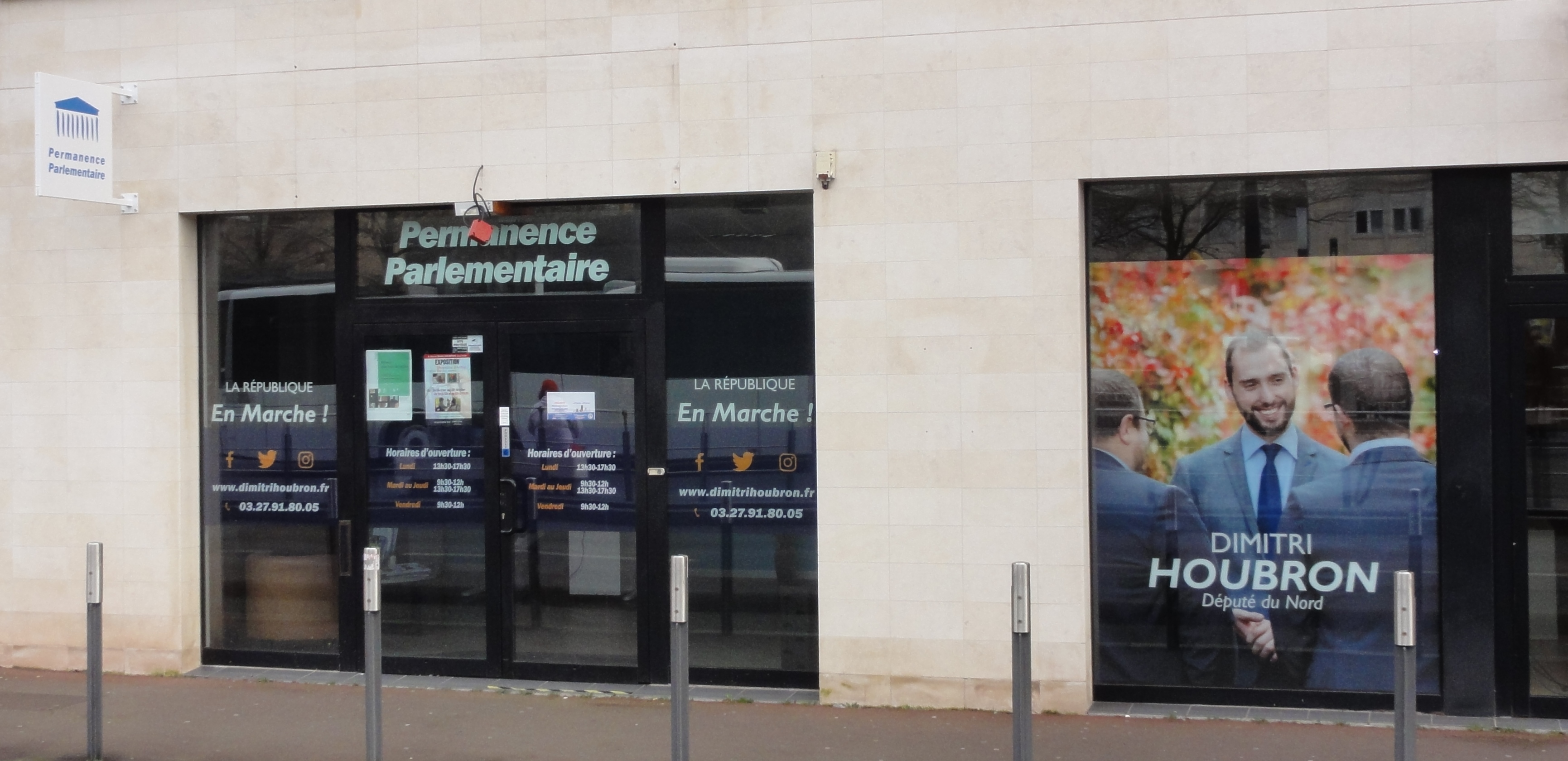 Permanence du député Dimitri Houbron. Depicted place: Douai